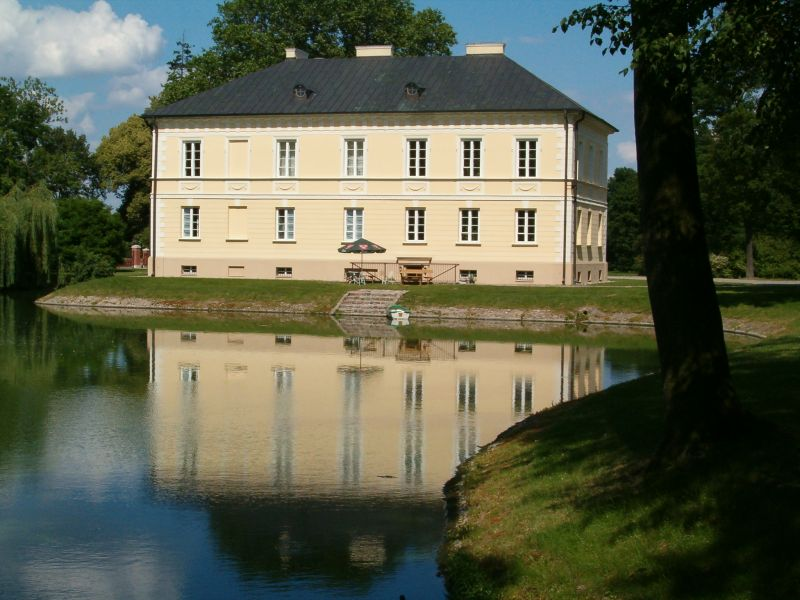 Muzeum: Zespół Pałacowo Parkowy w Dobrzycy, woj. wielkopolskie, powiat pleszewski, gmina Dobrzyca,Pałac Gorzeńskich (elewacja zachodnia)